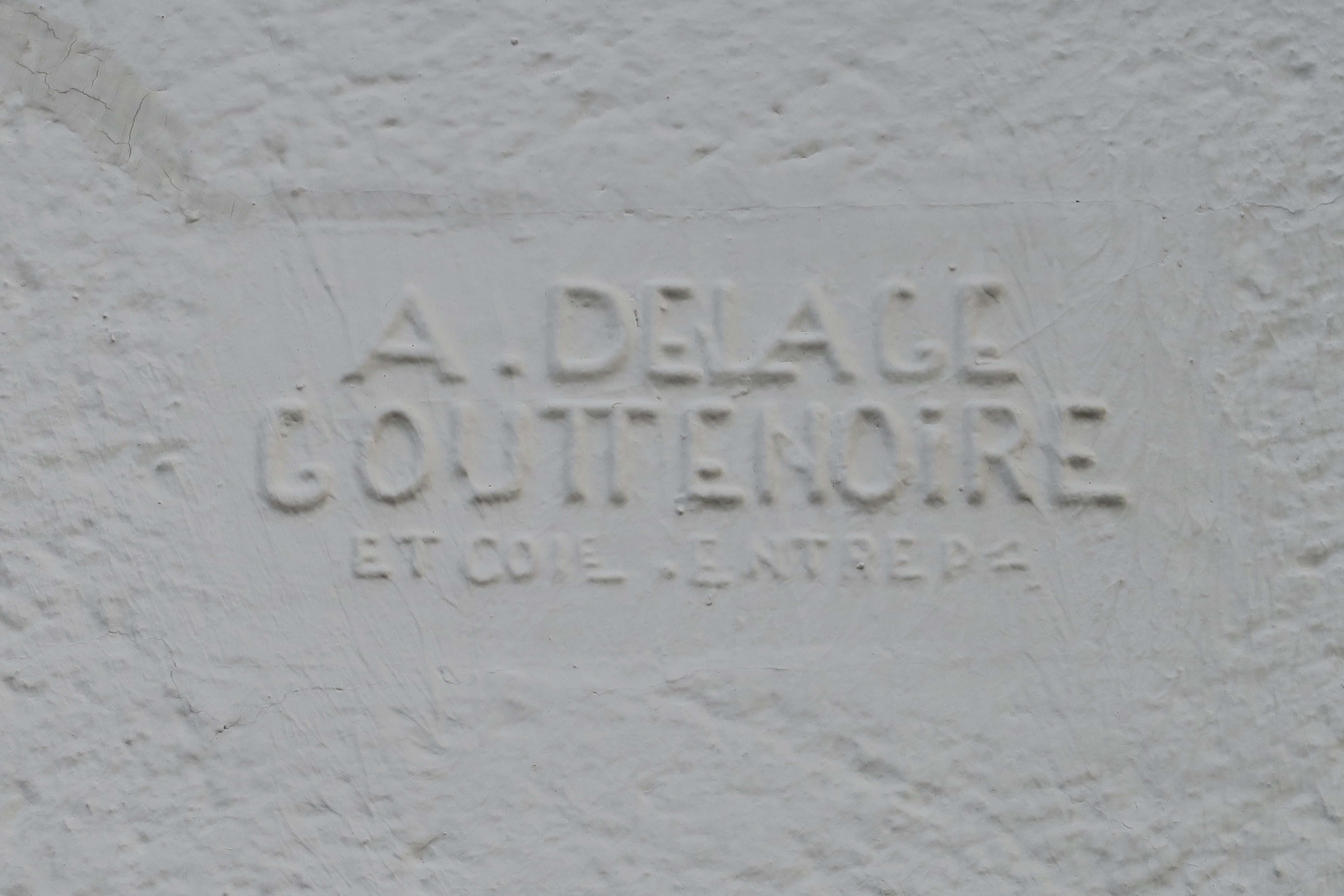 plaque A. Delage - Gouttenoire posée sur le bâtiment nouvellement construit au Touquet-Paris-Plage